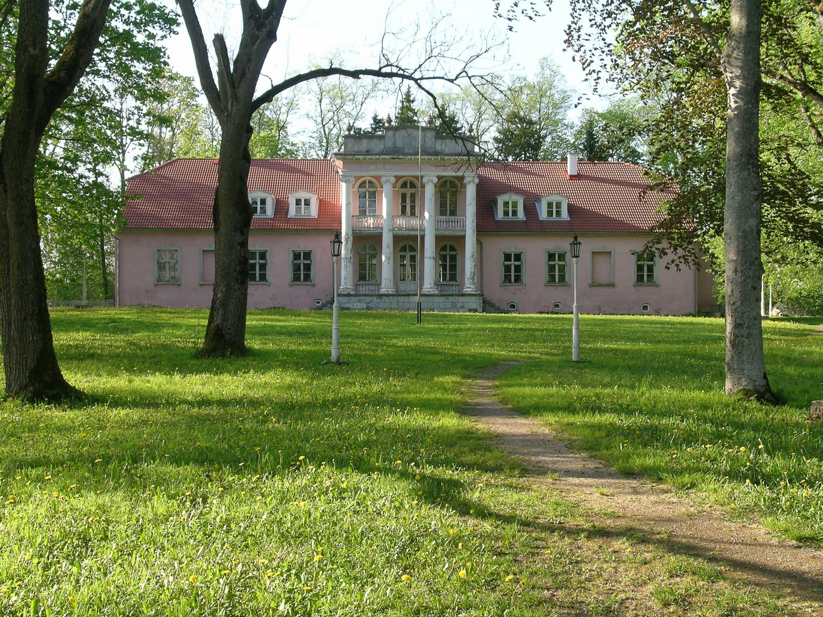 Kõljala mõisa peahoone